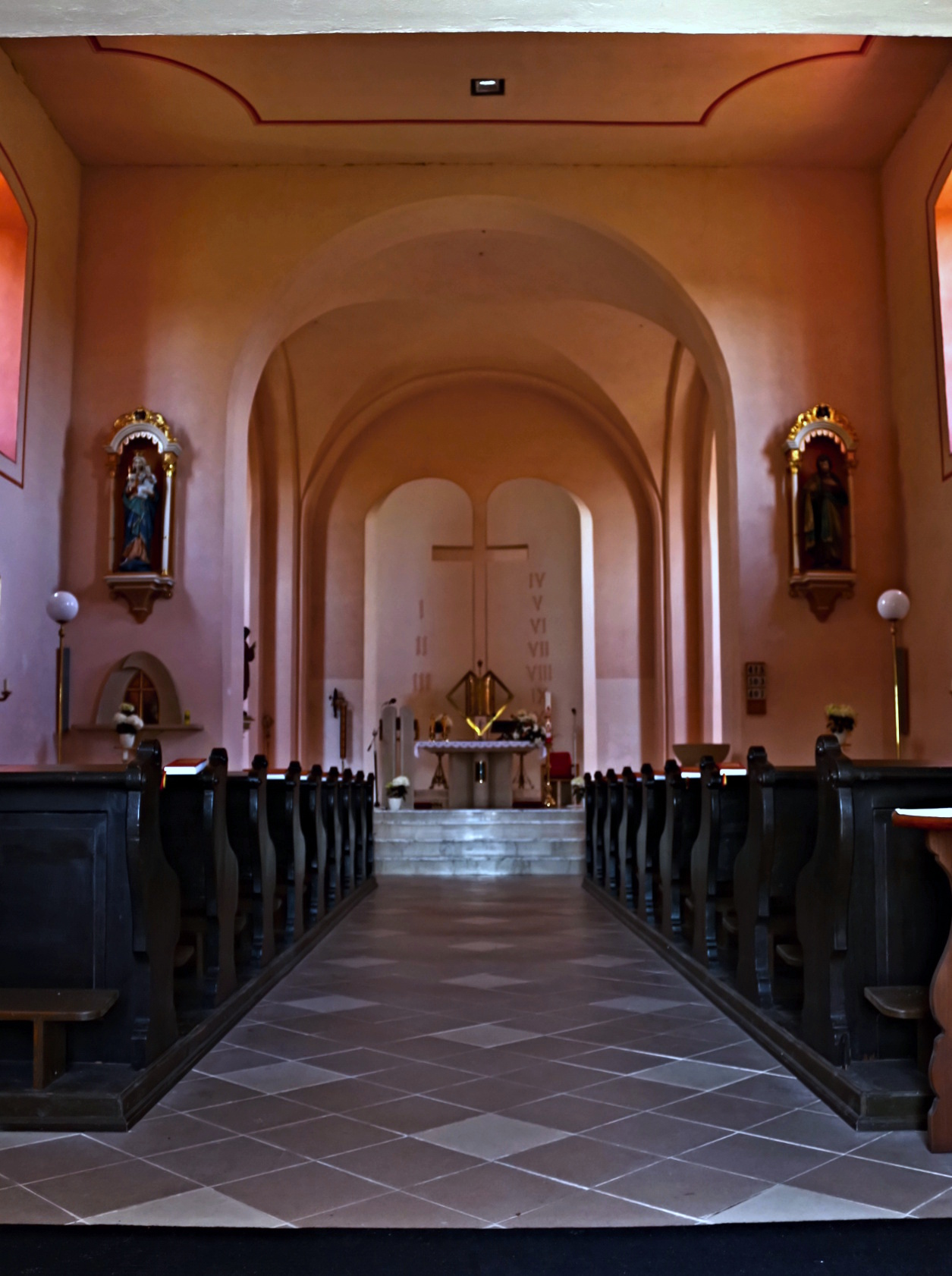 Mařenice kostel